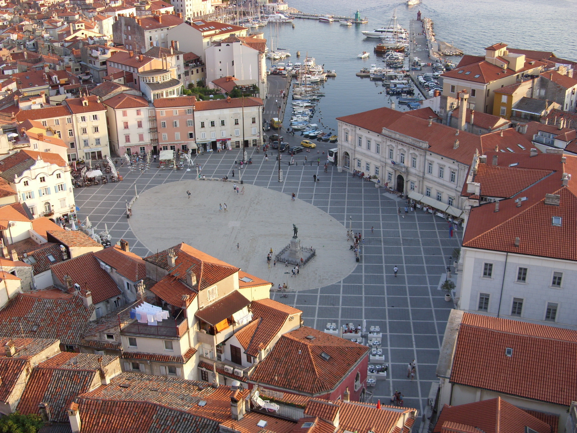 Der Tartini-Platz in Piran (Slowenien) von oben. Hornjoserbsce: Tartiniowe naměsto w Piranje (Słowjenska) wothorjeka.